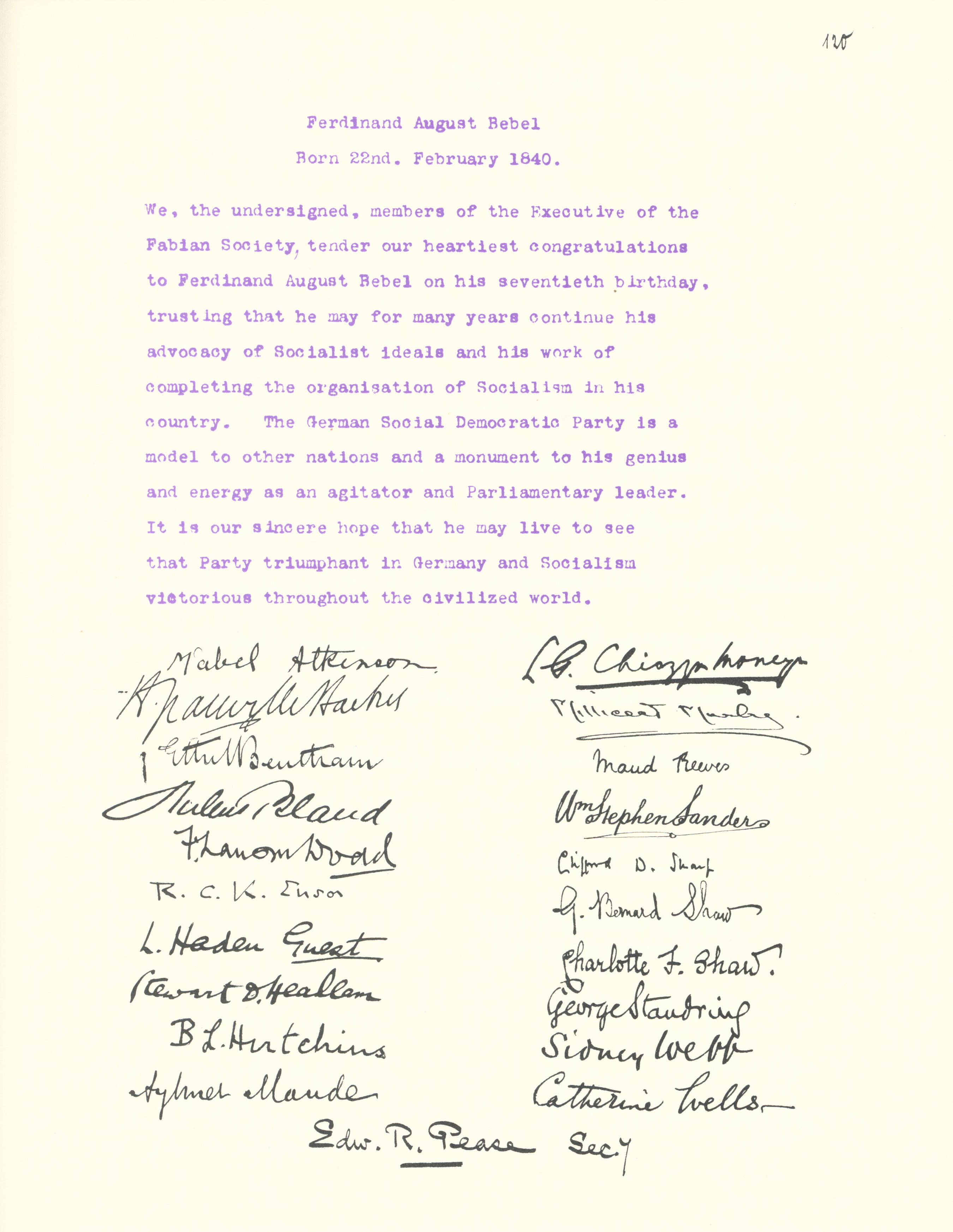 Glückwunschschreiben zum 70. Geburtstag von August Bebel: Fabian Society (England)